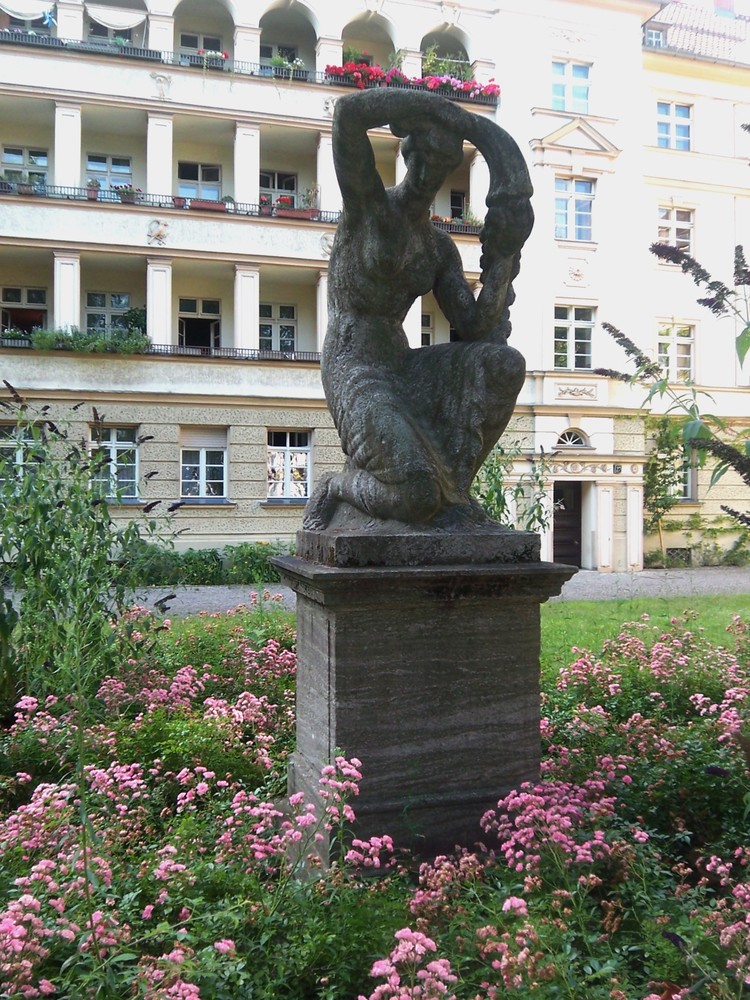 FLORA-DENKMAL in Berlin-SPANDAU. Siehe: Flora-Denkmal (1919)